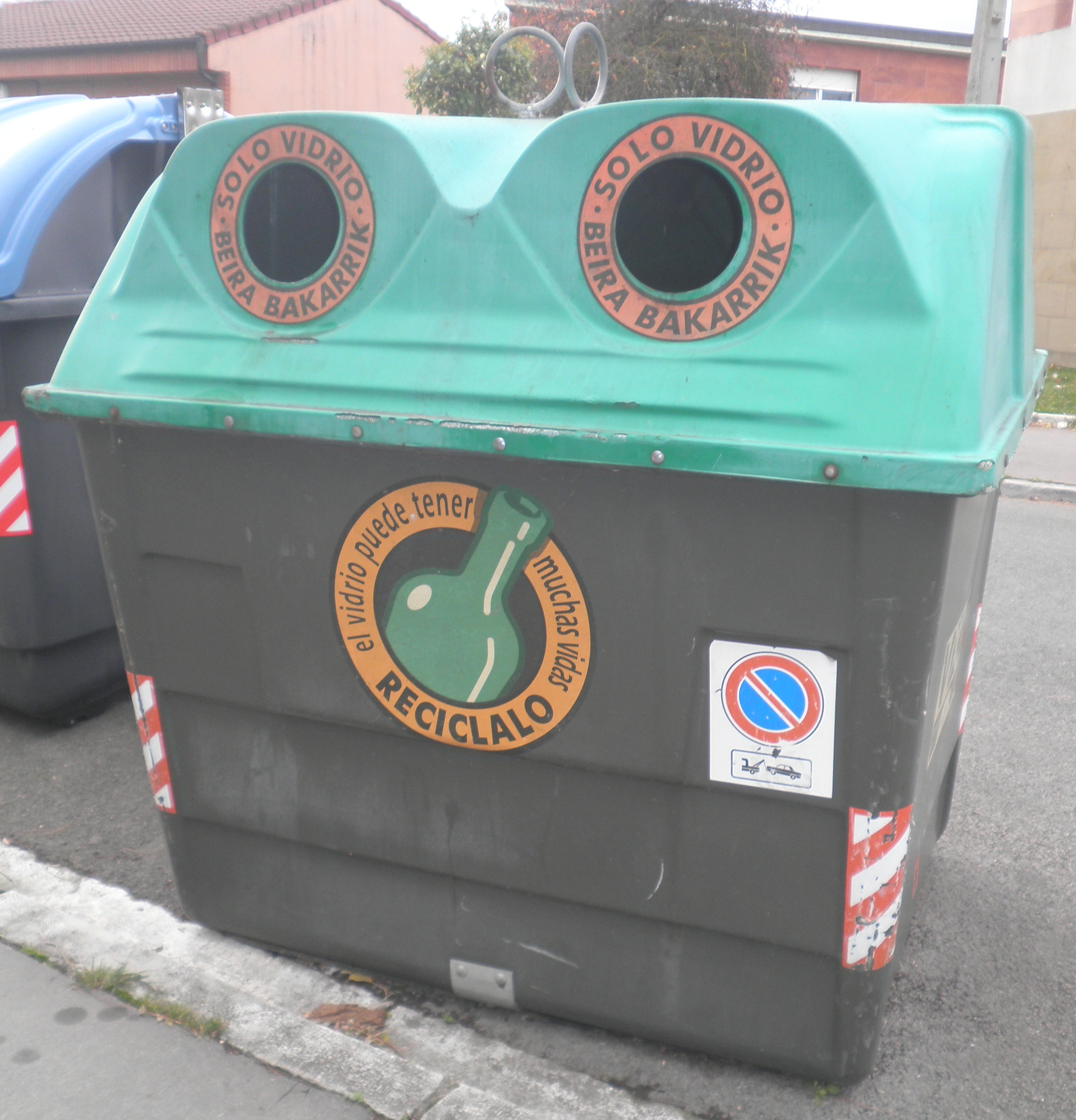 Ecovidrio Gasteiz